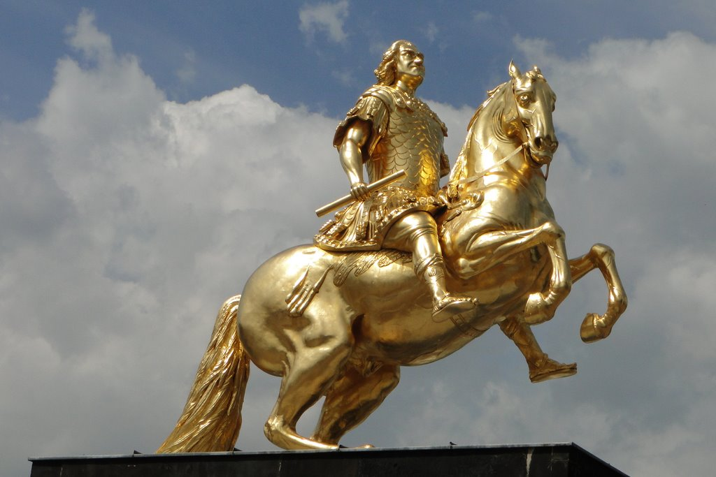 Золотой всадник (Памятник Августу Сильному в Дрездене)